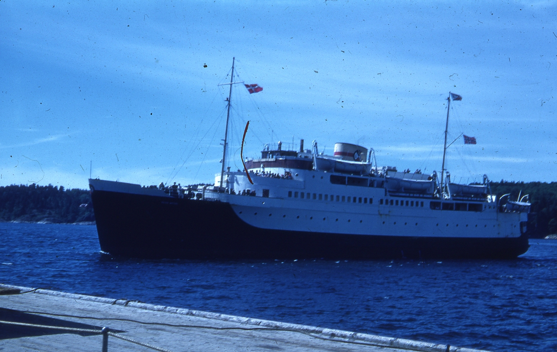 Fergen Peter Wessel